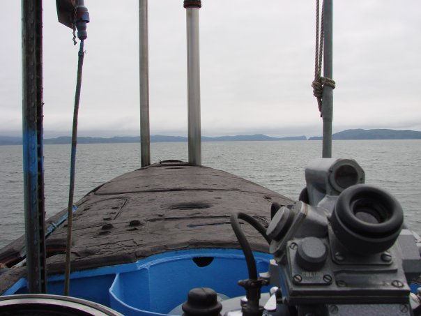 Мостик по походному. К-433 проекта 667БДР "Кальмар"